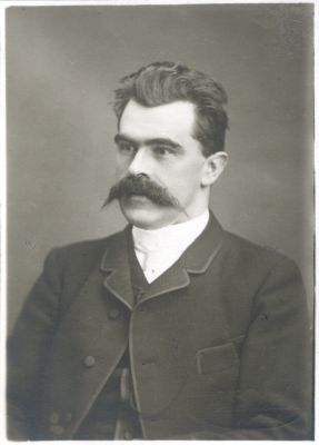 Carl Magnus Bergbohm